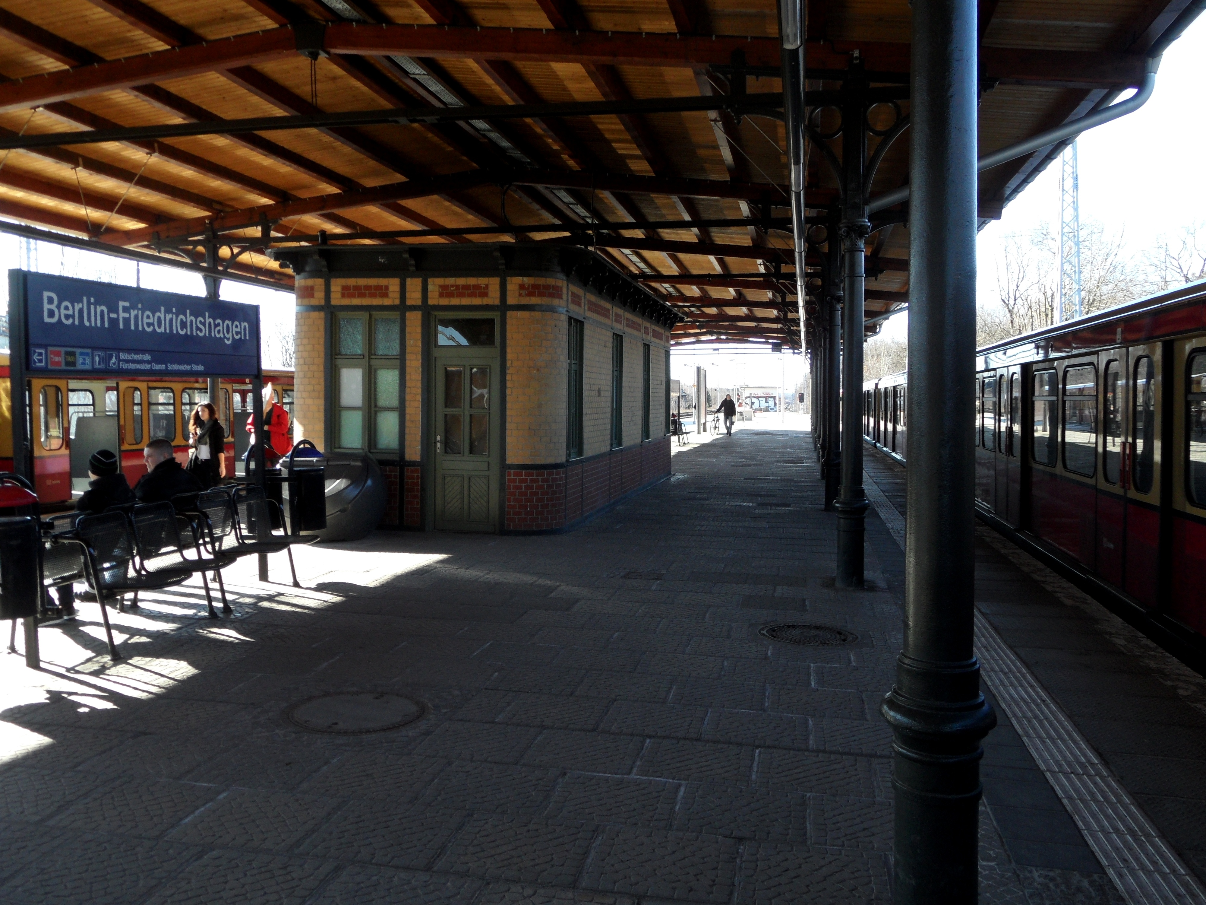 Berlin - S-Bahnhof Friedrichshagen - Linie S3